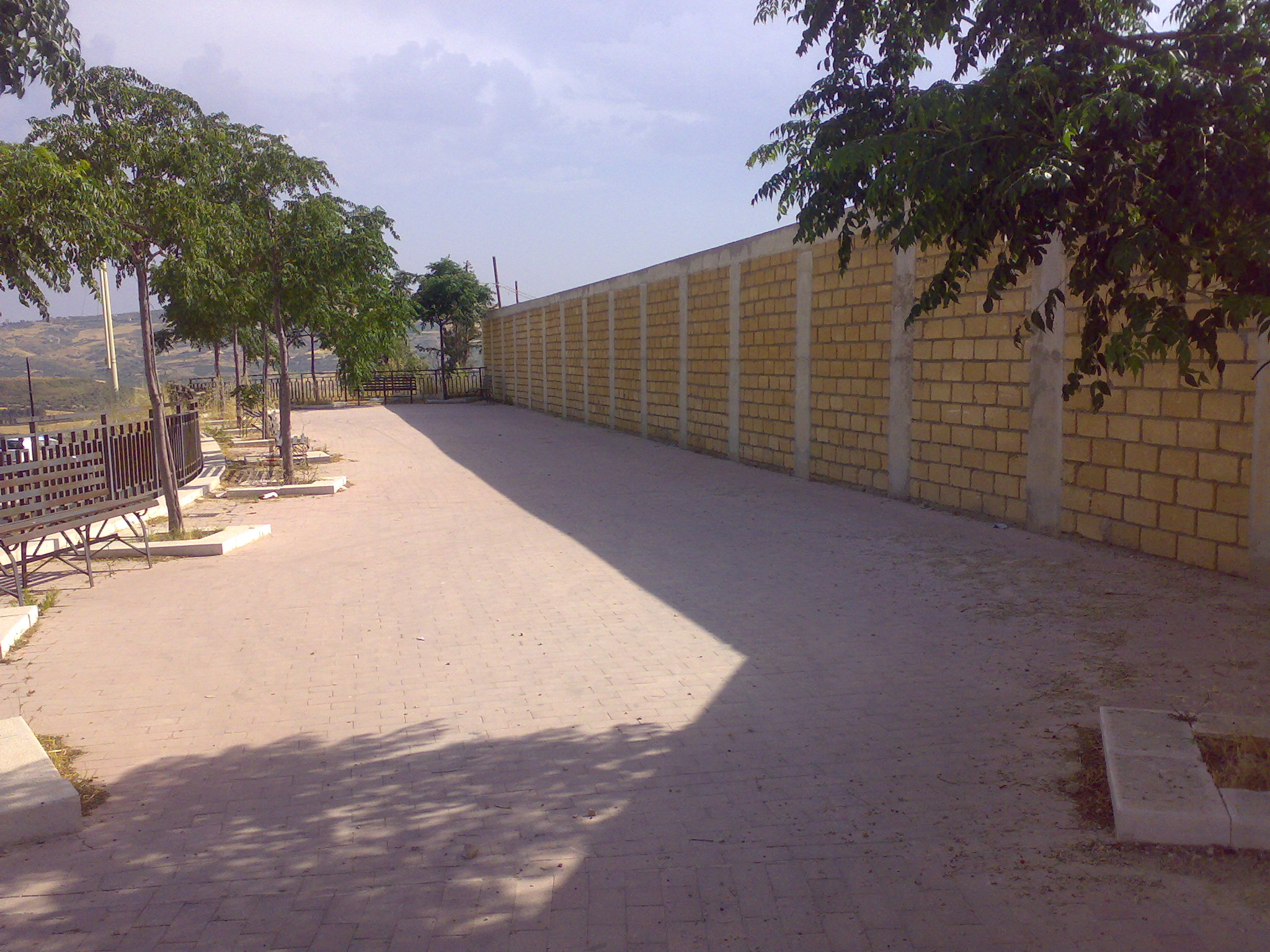 Stadio